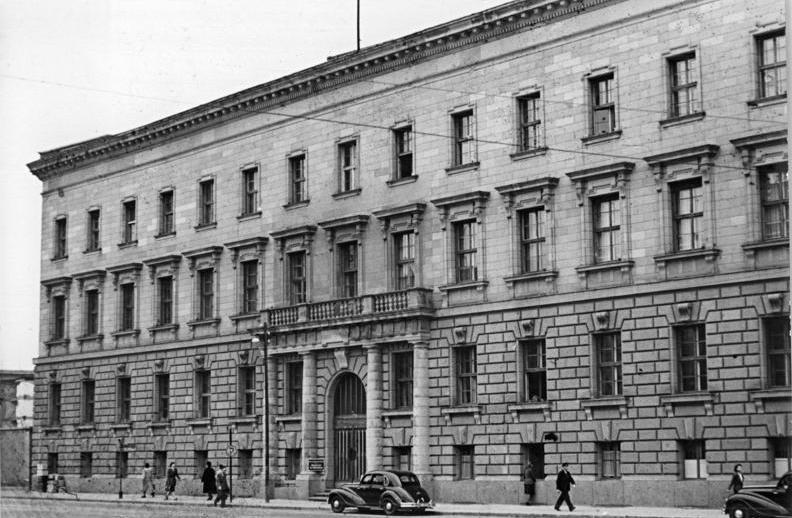 Berlin, Wilhelmstraße, Ministerium für Volksbildung Zentralbild Junge 23.4.52 Berlin 1952.Das Ministerium für Volksbildung in der Wilhelmstraße. (Kritikaufnahme für "Frischer Wind")